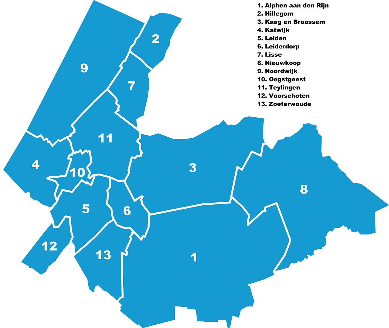 Overzichtkaartje van de samenwerkende gemeenten in de regio Holland Rijnland.